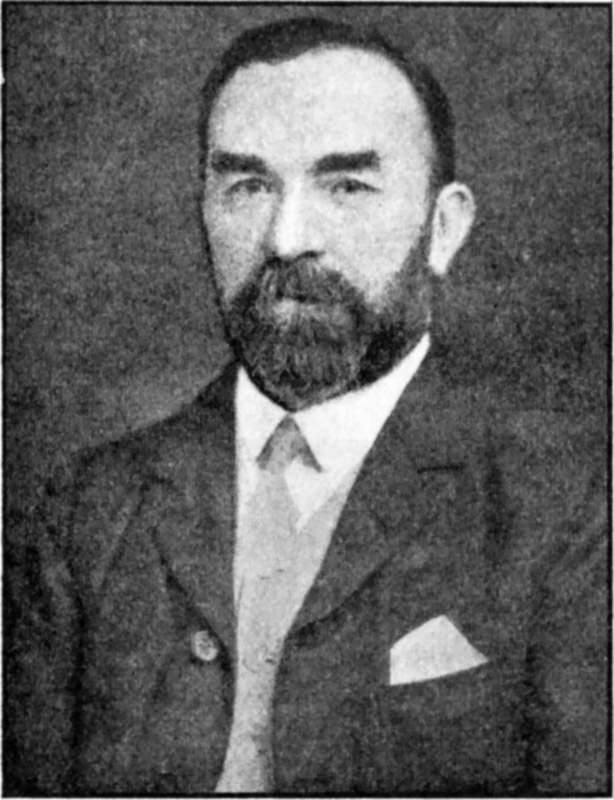 Henry Hugh Clutton, (1850-1909), britischer Chirurg